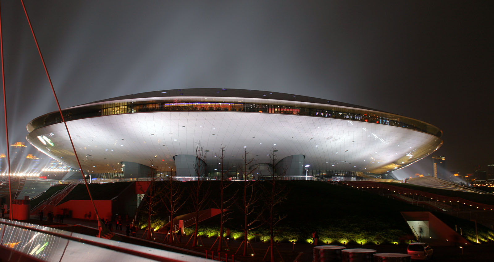 Shanghai Expo Cultural Center